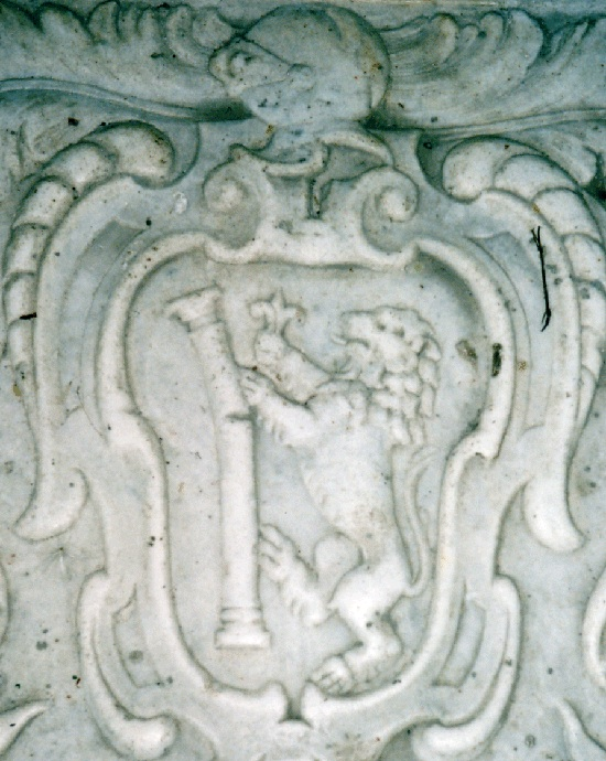 Stemma della famiglia Basso della Rovere D'Aragona